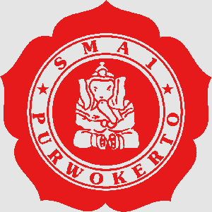 Lambang SMA Negeri 1 Purwokerto